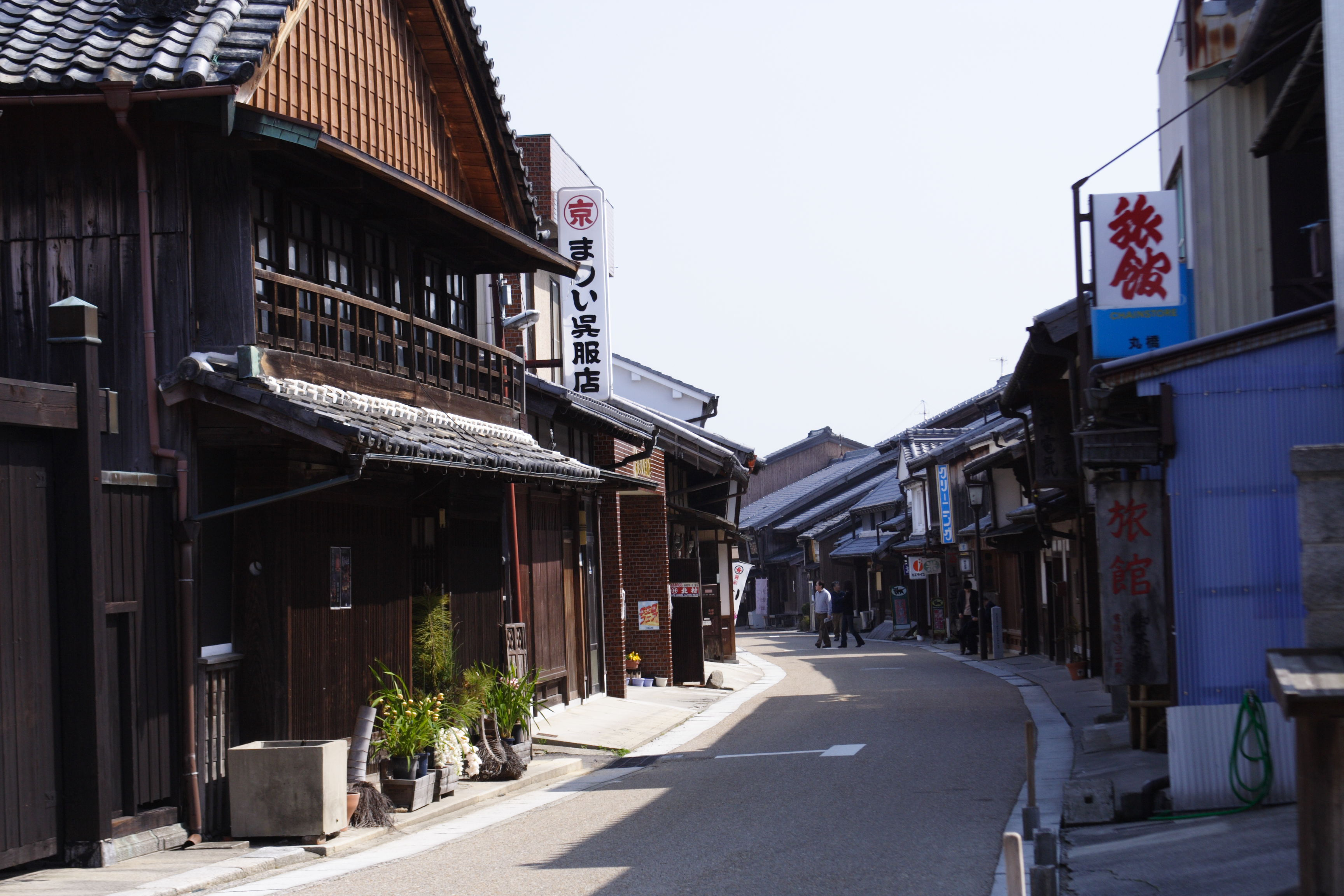 東海道五十三次・関宿(三重県・亀山市)/Sekijuku on Tokaido(Kameyama City, Mie, Japan)